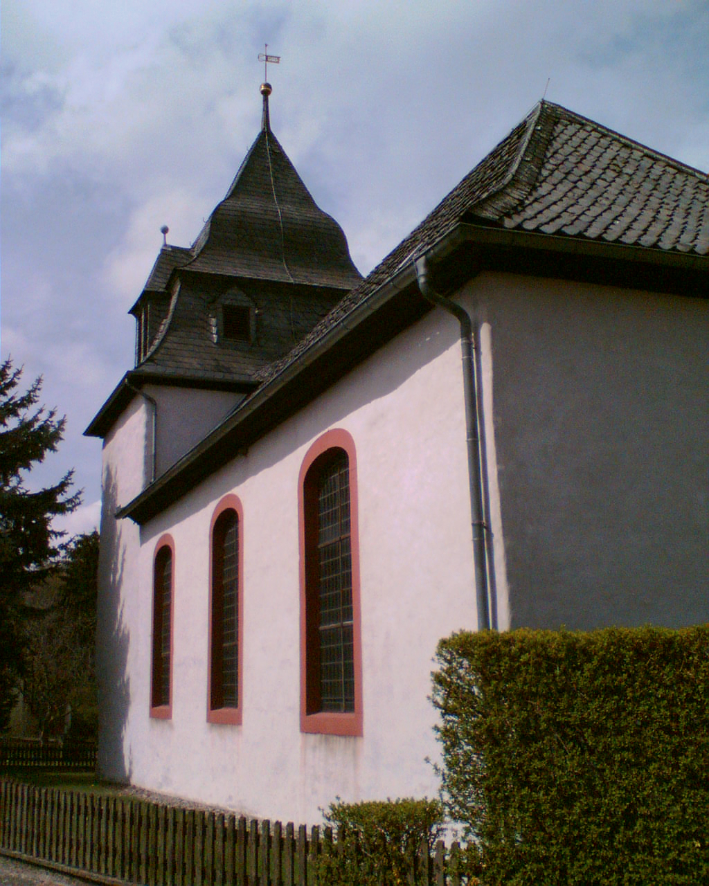 Rittierode, Landkreis Northeim